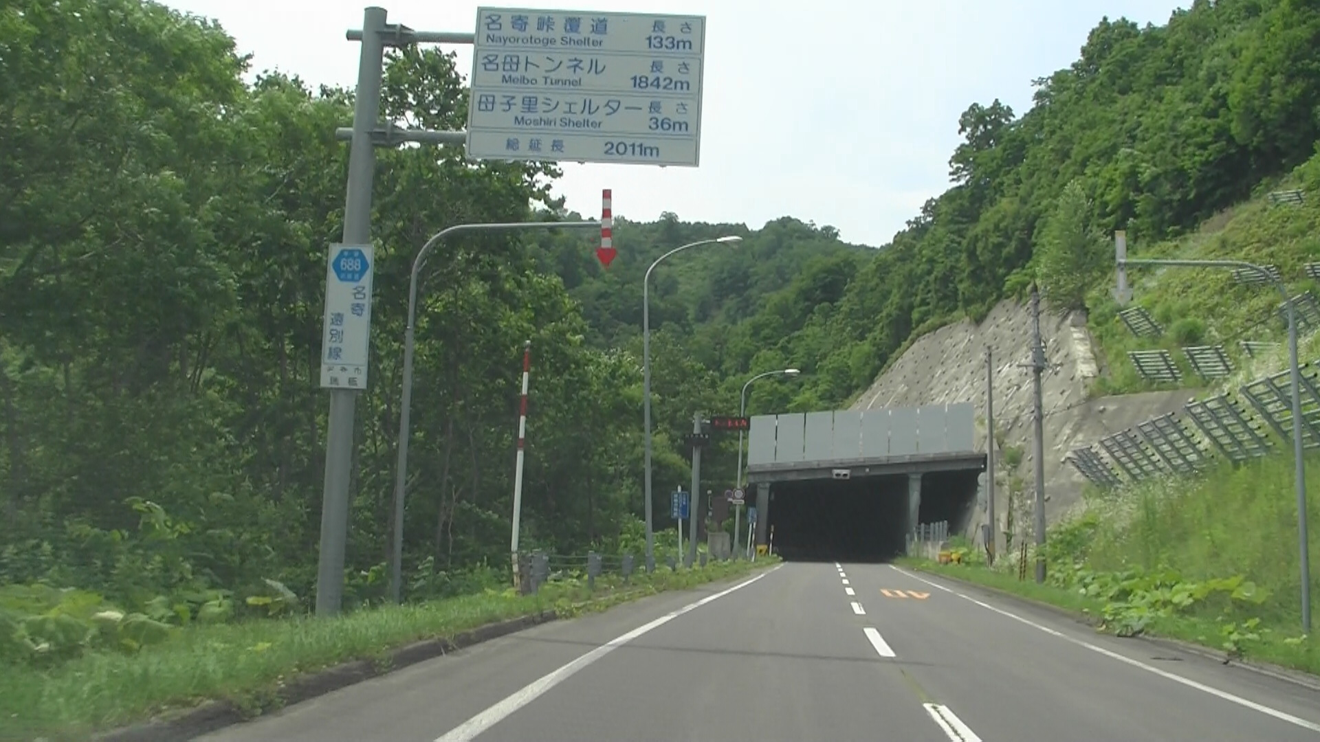 北海道道688号名寄遠別線（名寄峠母子里シェルター）